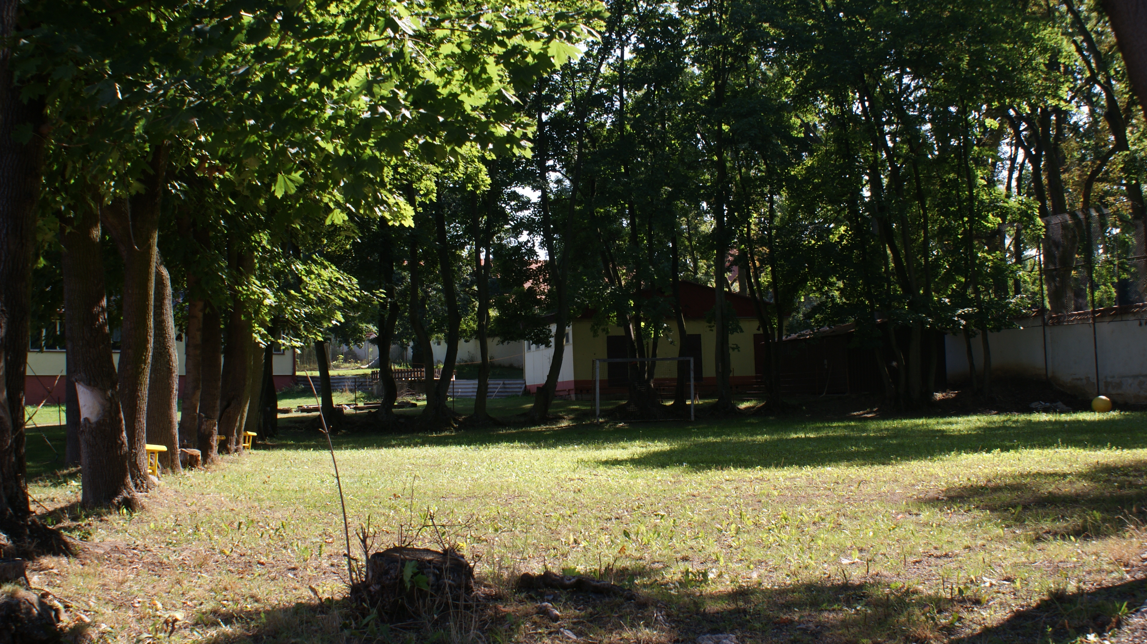 Pohled ze severu na jih na hřiště Areálu Liteň ve směru od brány v ulici Pode Zděmi